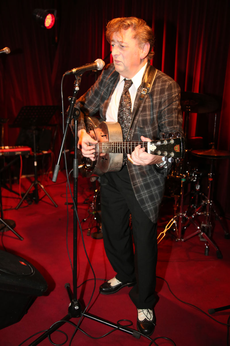 Al Cook-9383